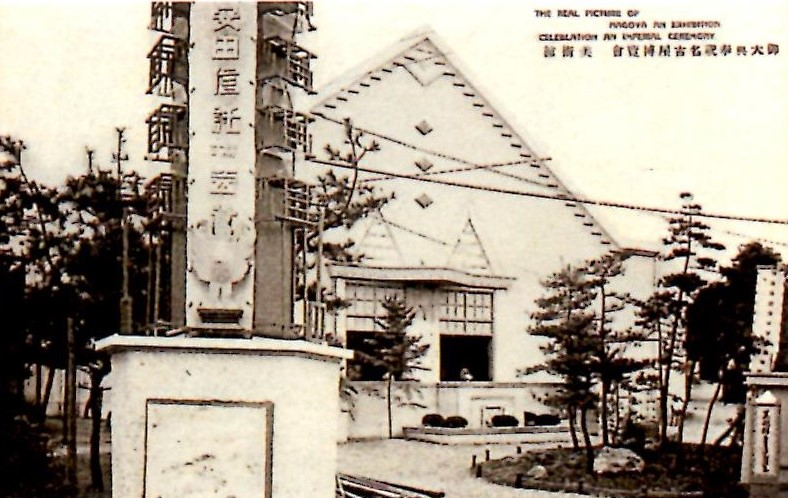 1928年に鶴舞公園で開催された御大典奉祝名古屋博覧会。会場内にあった美術館。